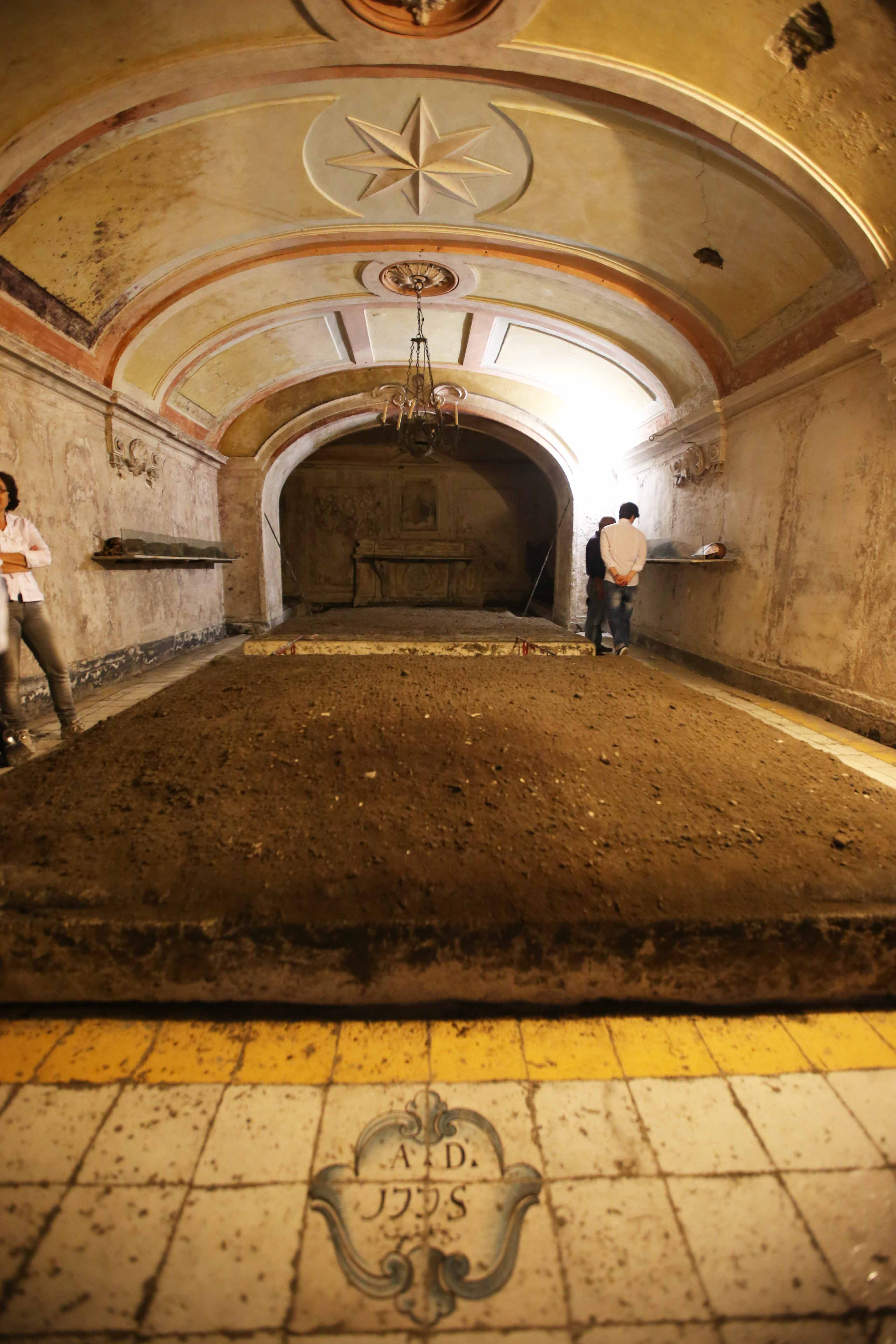 cripta